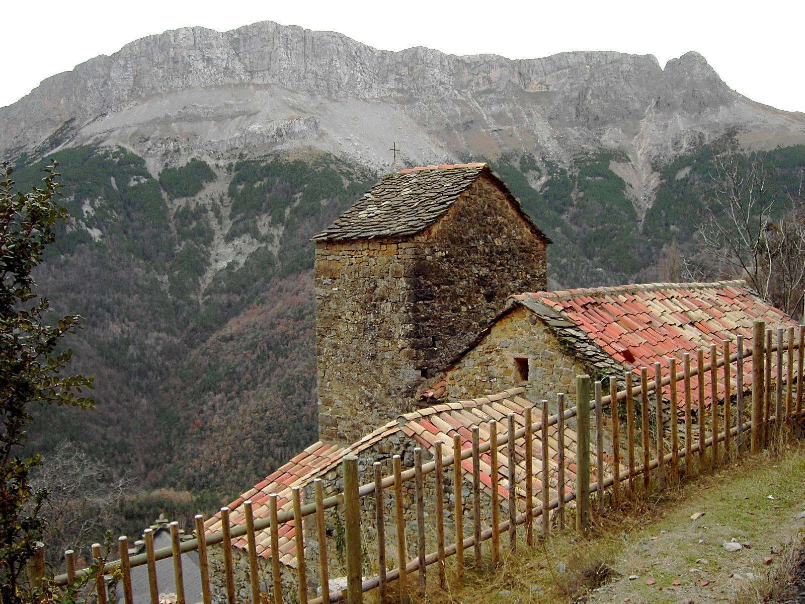 La iglesia de Revilla, con el Castillo Mayor de fondo.